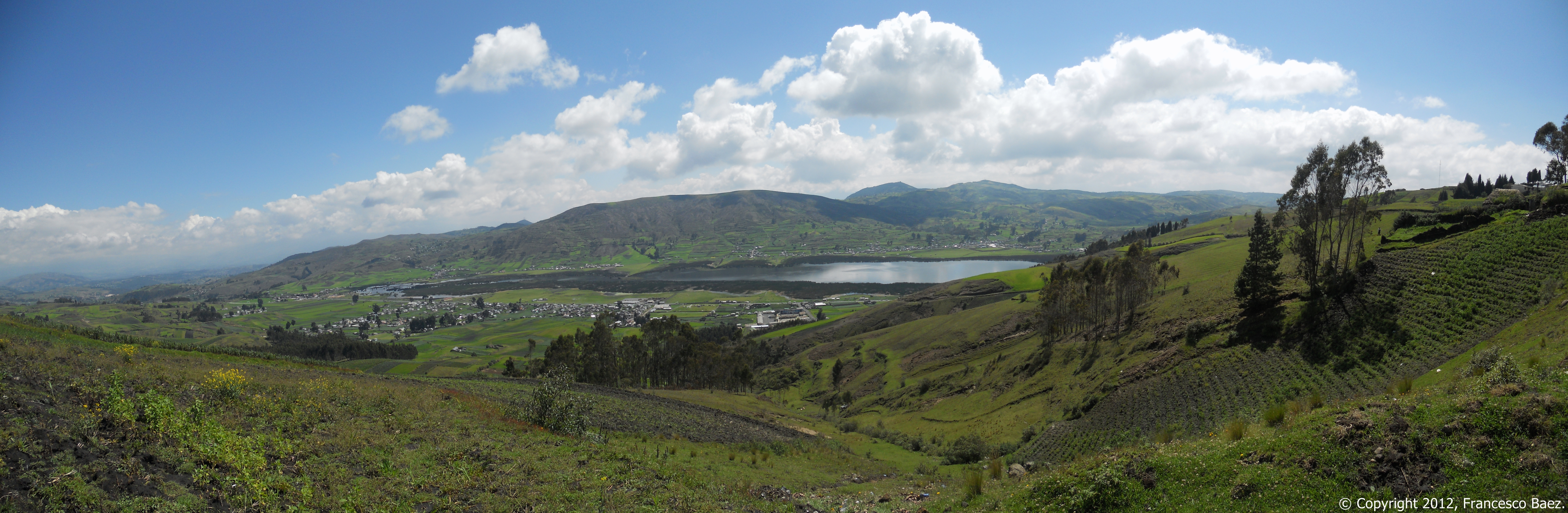 Laguna de Colta - 2012